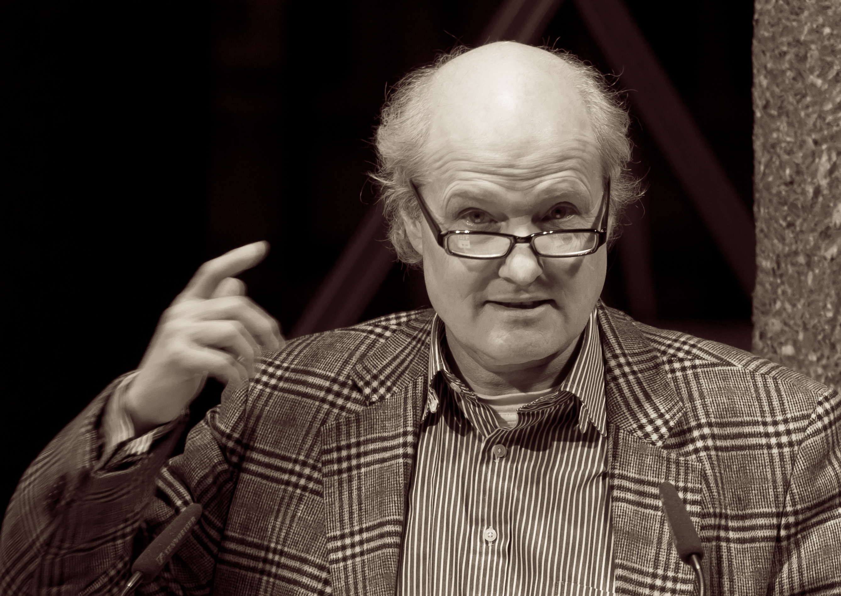 Reinhard Matz, Fotograf und Publizist aus Köln und Berlin, bei einem Vortrag 2014 im Kölner Domforum.